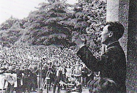 日比谷公園・小音楽堂で演説する武井昭夫全学連委員長 1949年5月24日学生決起大会